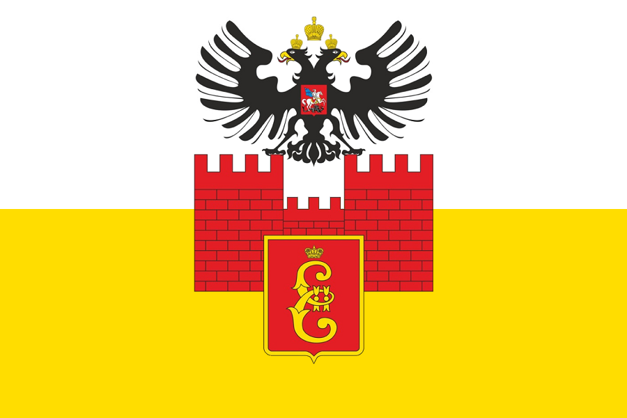 Flag of Krasnodar, Krasnodar krai (2006)